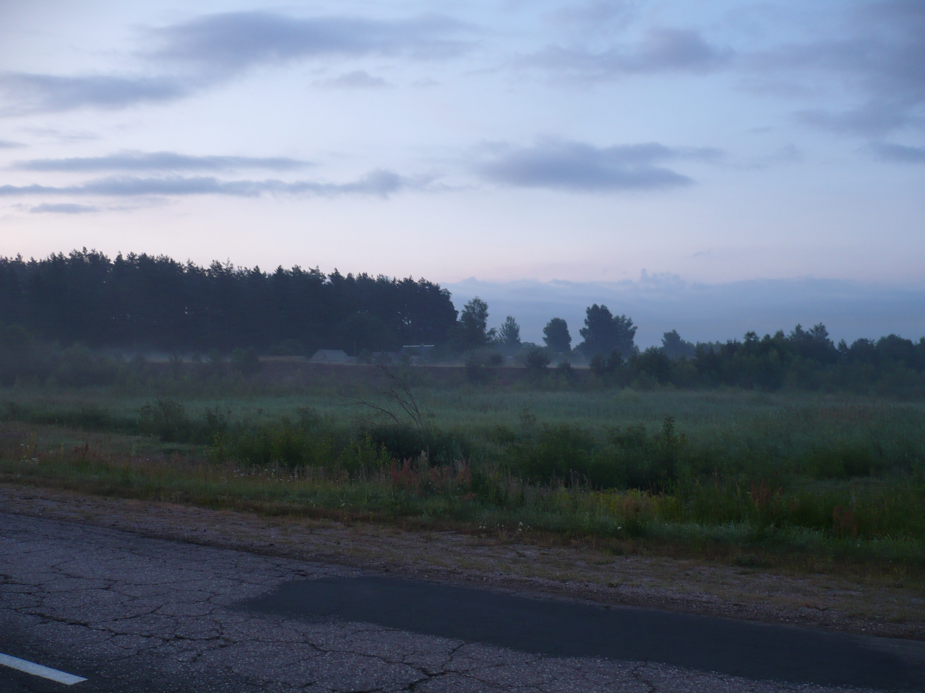 Migla pie Vērgales, 2009.gads